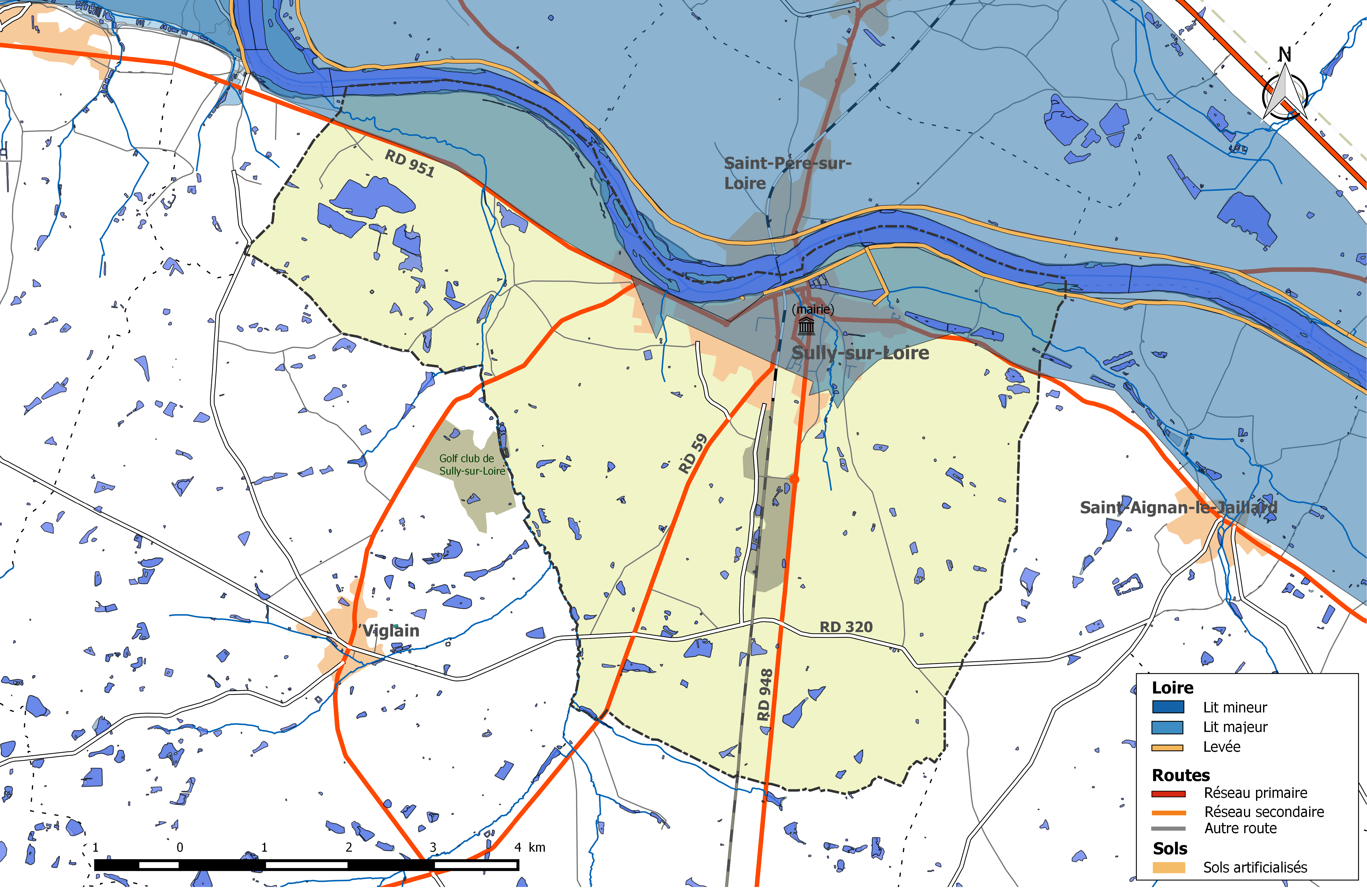 Zone inondable et réseaux hydrographique et routier de la commune de Sully-sur-Loire.